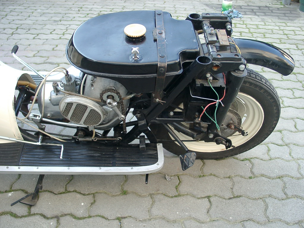 Silnik skutera WFM Osa.